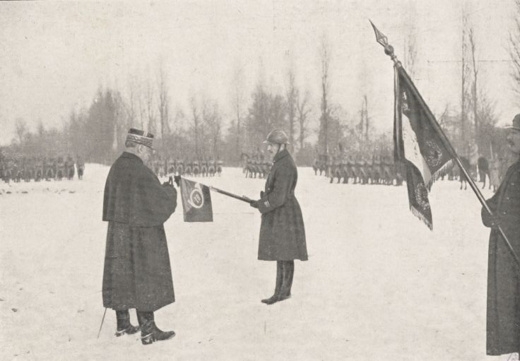 Remise de la fourragère au 18e Bataillon de Chasseurs, au bord du Rhin. (Neubourg, février 1919).